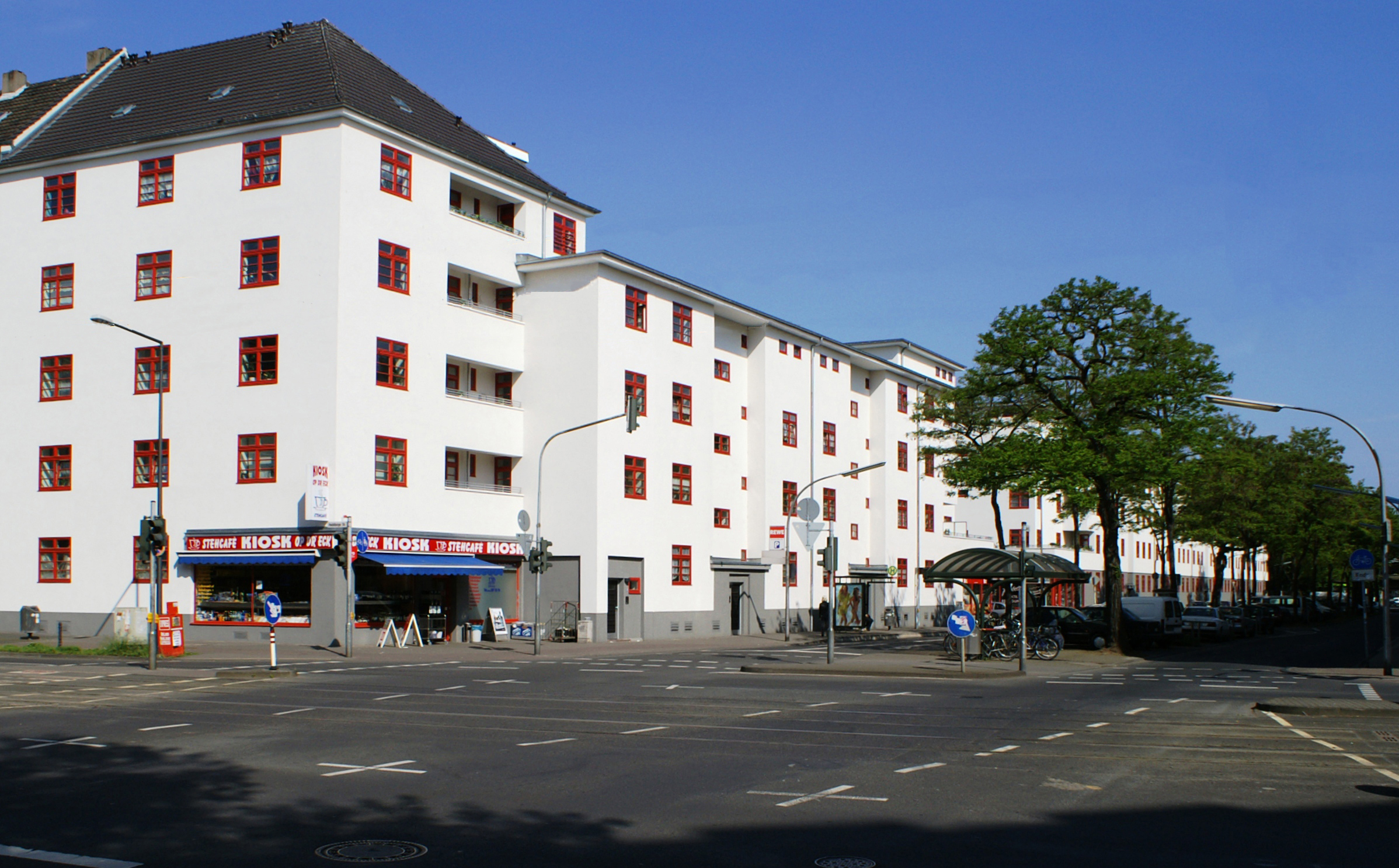 Köln-Buchforst, sanierte Siedlung Blauer Hof